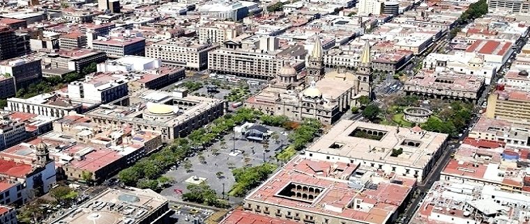 Clima Gdl 21 ago 2013 - Zona Centro